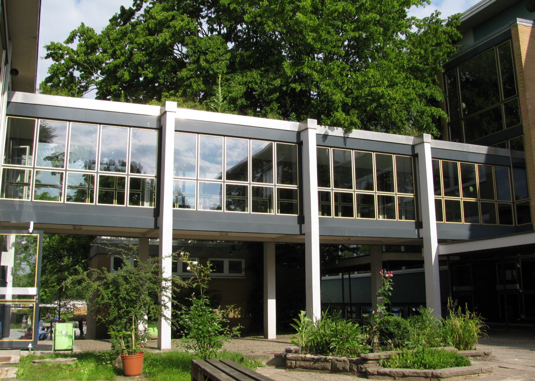 Landgraf-Ludwigs-Gymnasium Gießen, Passage zwischen Haus A und B, Quelle: Privatarchiv